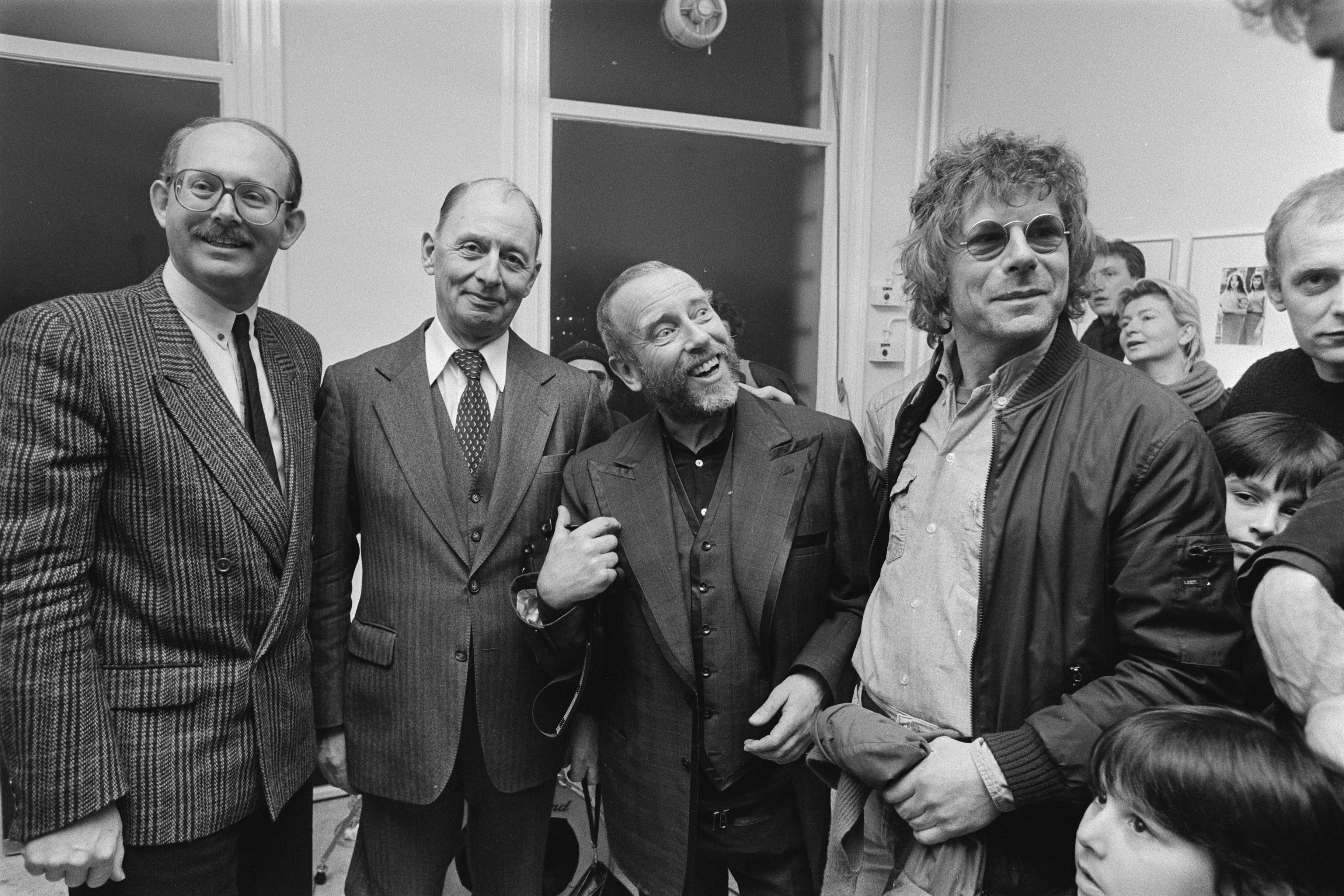 Bij opening fototentoonstelling Ed van der Elsken en Peter Martens werd bekend gemaakt dat de fotocollectie van Bert Hartkamp door het rijk is aangekocht. Van links naar rechts: Jan Riezenkamp, Bert Hartkamp, Ed van der Elsken, Peter Martens